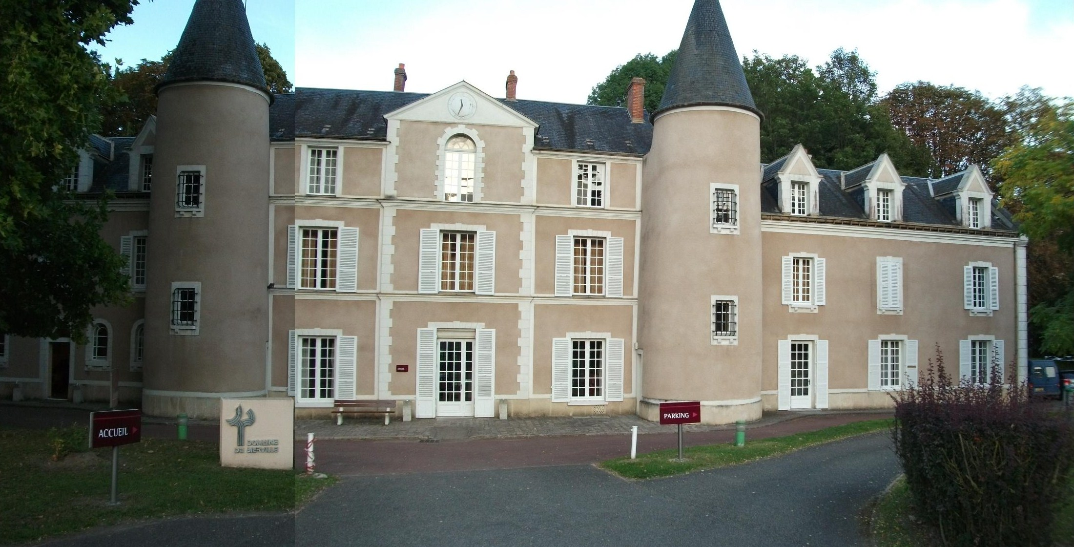 Bierville, centre de formation et de congrés de la C.F.D.T.